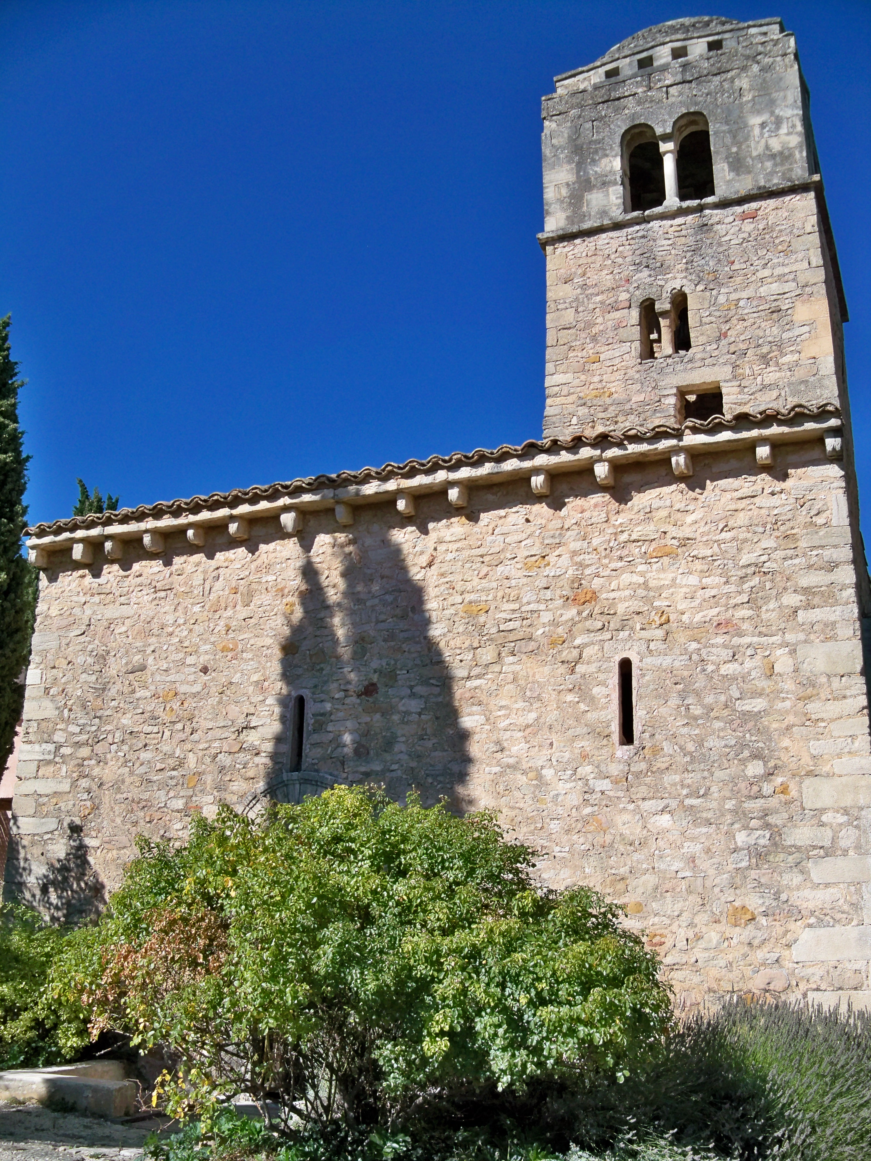 Chapelle de la Madeleine à Bédoin (84)